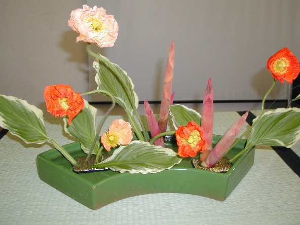 Rinpa2